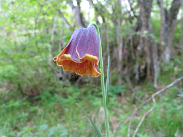 Fritillaria pyrenaica - Valle de Mena, Burgos